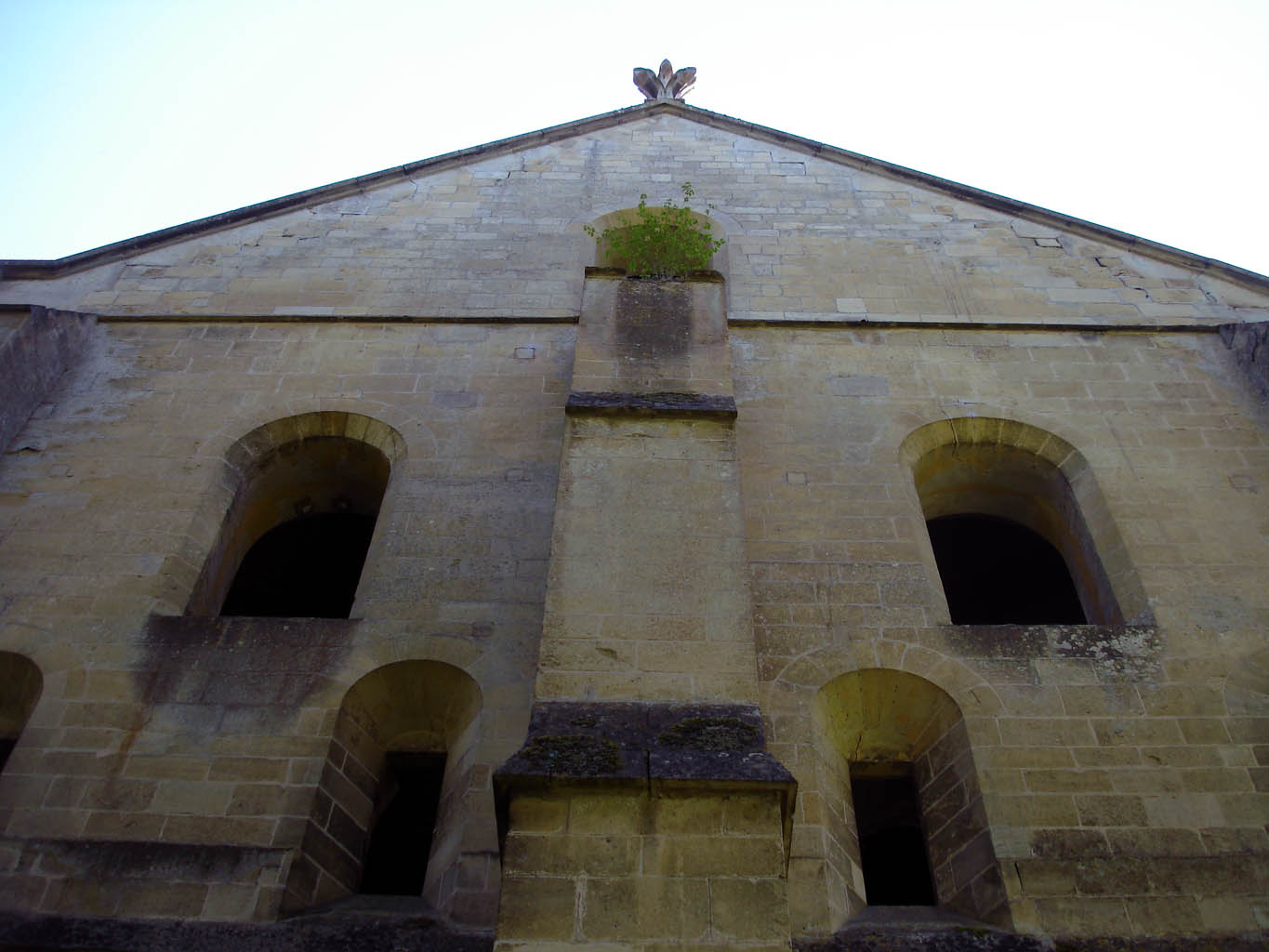 Abbaye Notre-Dame du Val, pignon nord du bâtiment des moines, Mériel (Val-d'Oise), France.